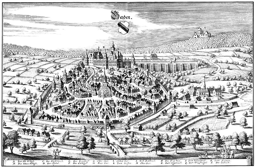 Ansicht von Baden-Baden im Jahre 1643